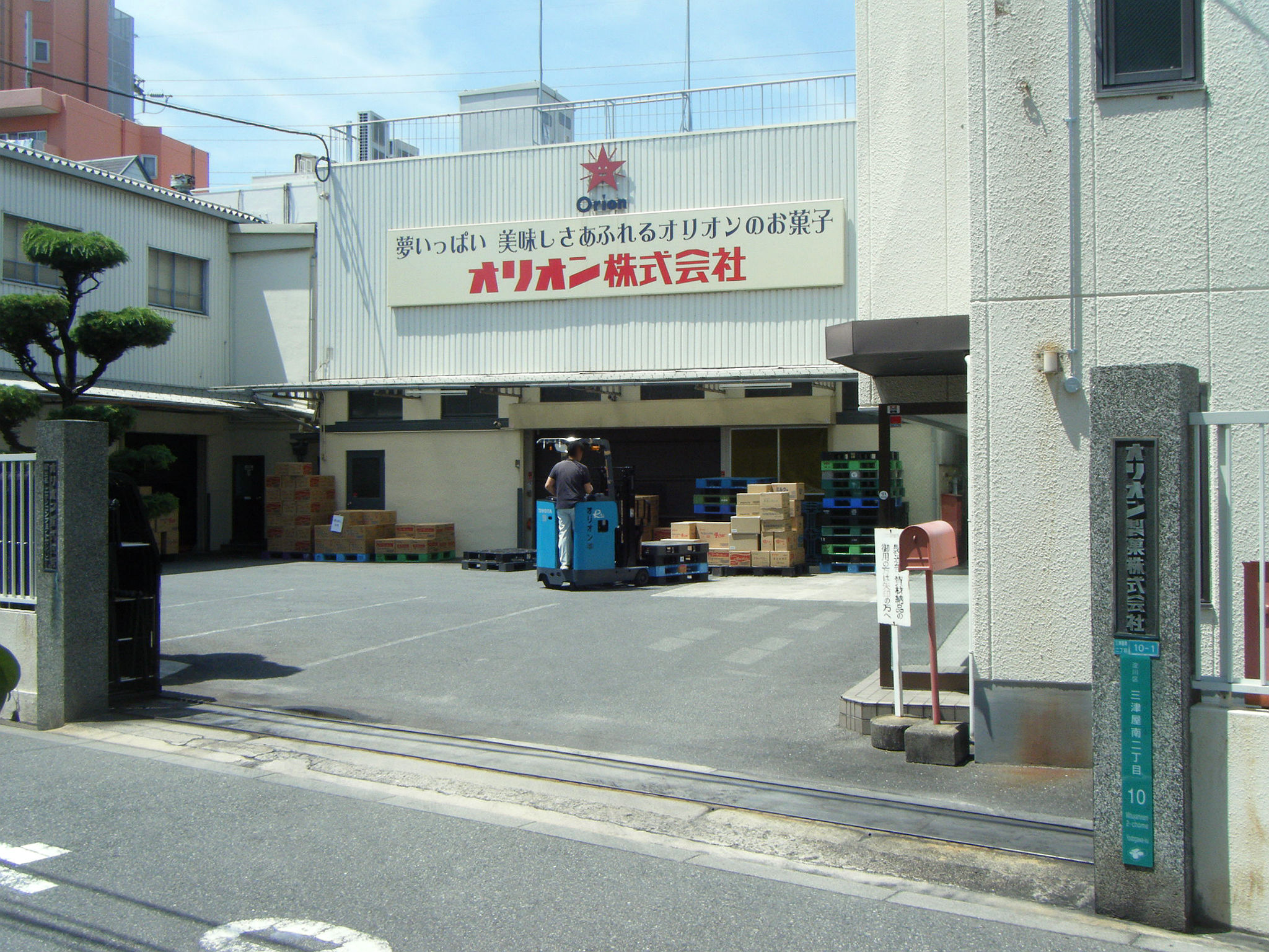 オリオン株式会社 本社 大阪市淀川区